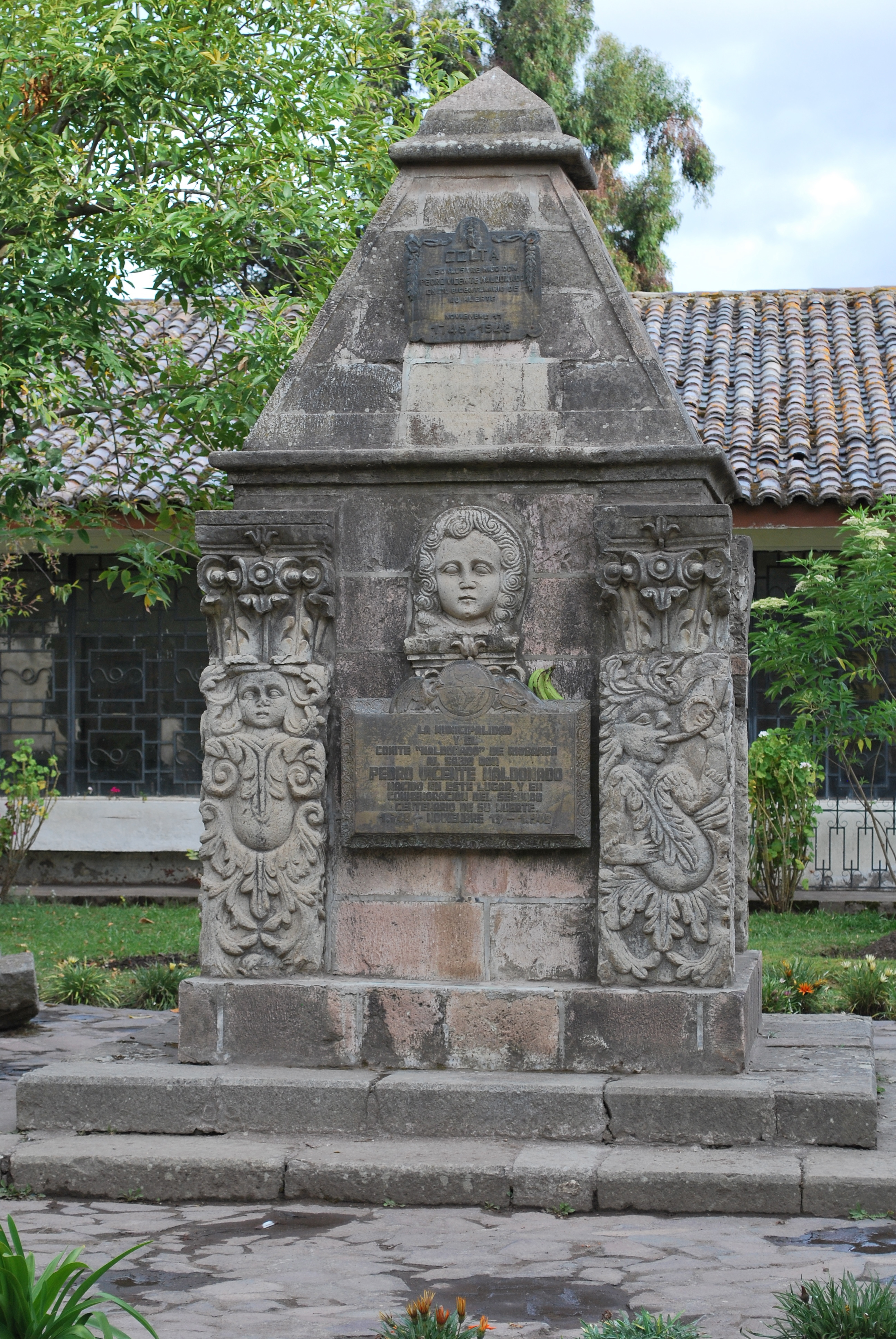 Lugar donde nació Pedro Vicente Maldonado Cajabamba - Ecuador